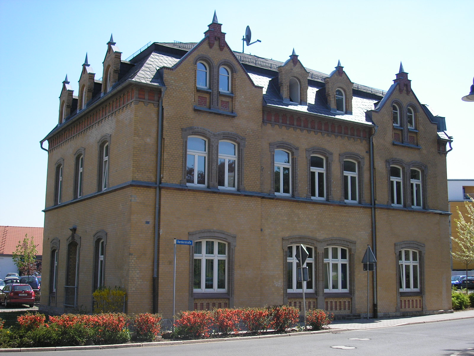 Das ehemalige Verwaltungsgebäude des Glaswerks "Sophienhütte" in Ilmenau (Thüringen). Es ist der einzige erhaltene Teil der Hütte.